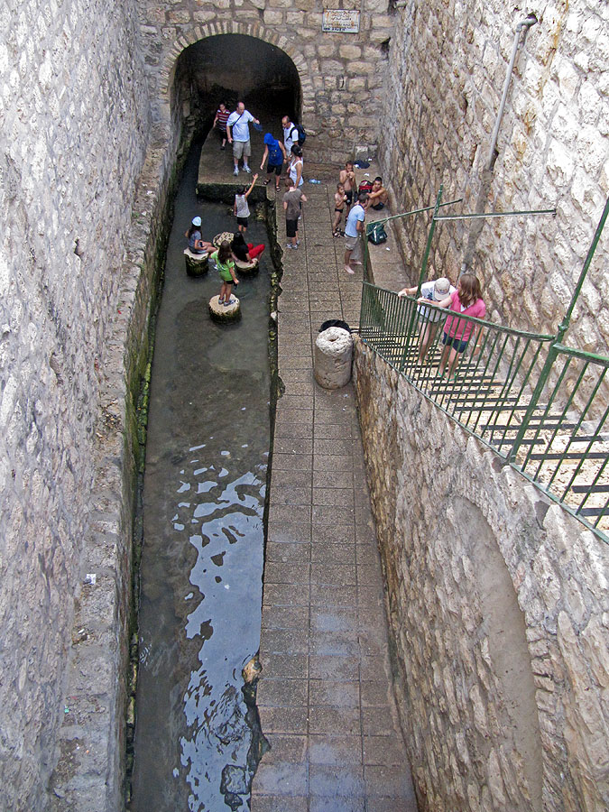 Byzantine Pool of Siloam בריכת השילוח הביזנטית